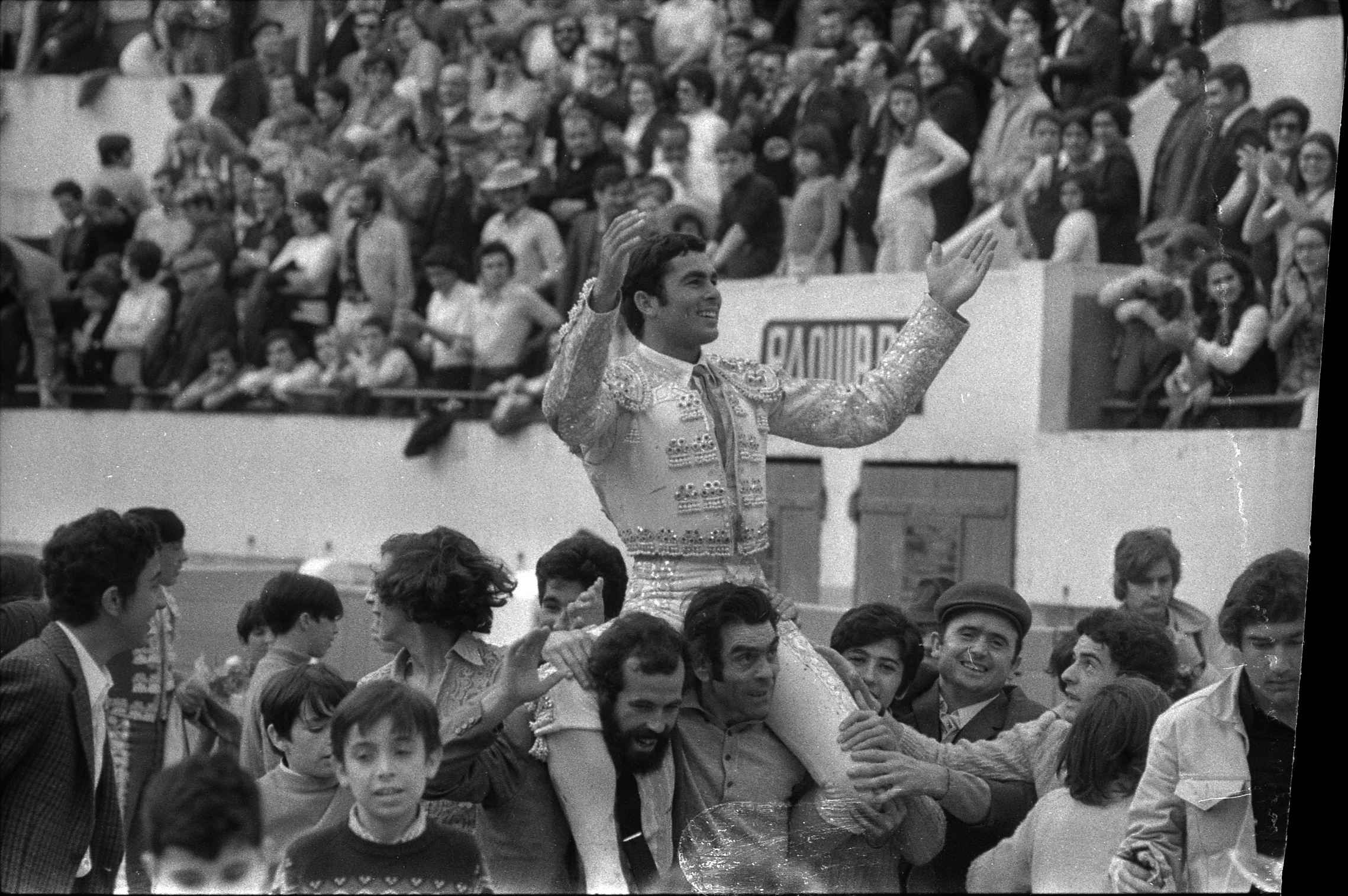 Corrida aux Arènes du Soleil d'Or (quartier des Arènes). 9 mai 1971. Scène de tauromachie. Tour d'honneur de Paquirri. Au premier plan deux hommes portent sur leurs épaules le matador Paquirri qui a les bras levés (plan rapproché, vue de 3/4 face), ils sont entourés d'enfants ; en arrière-plan premiers rangs des gradins avec spectateurs. Observation: Pour connaître les caractéristiques du taureau (âge, poids...), voir dans le fonds bibliothèque le document intitulé "Arènes du Soleil d'Or (avril 1955 - octobre 1966)", cote 2397. Ce document compile les copies des notes manuscrites prises lors des corridas.